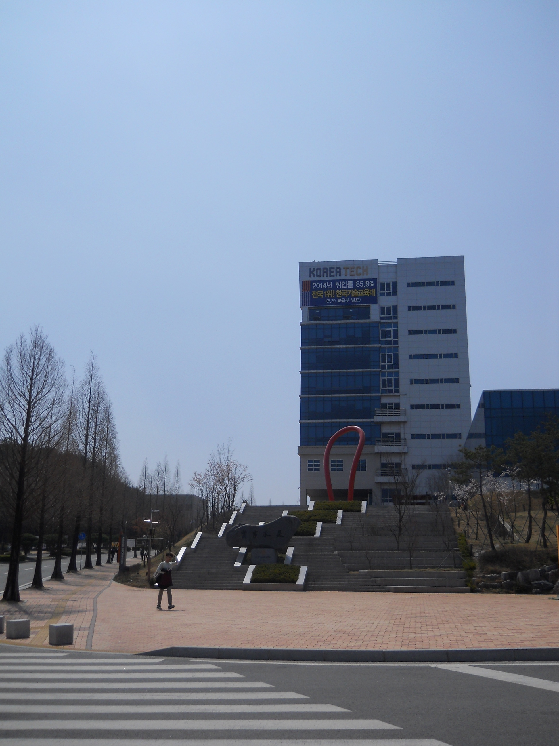 2015년 4월 담헌실학관